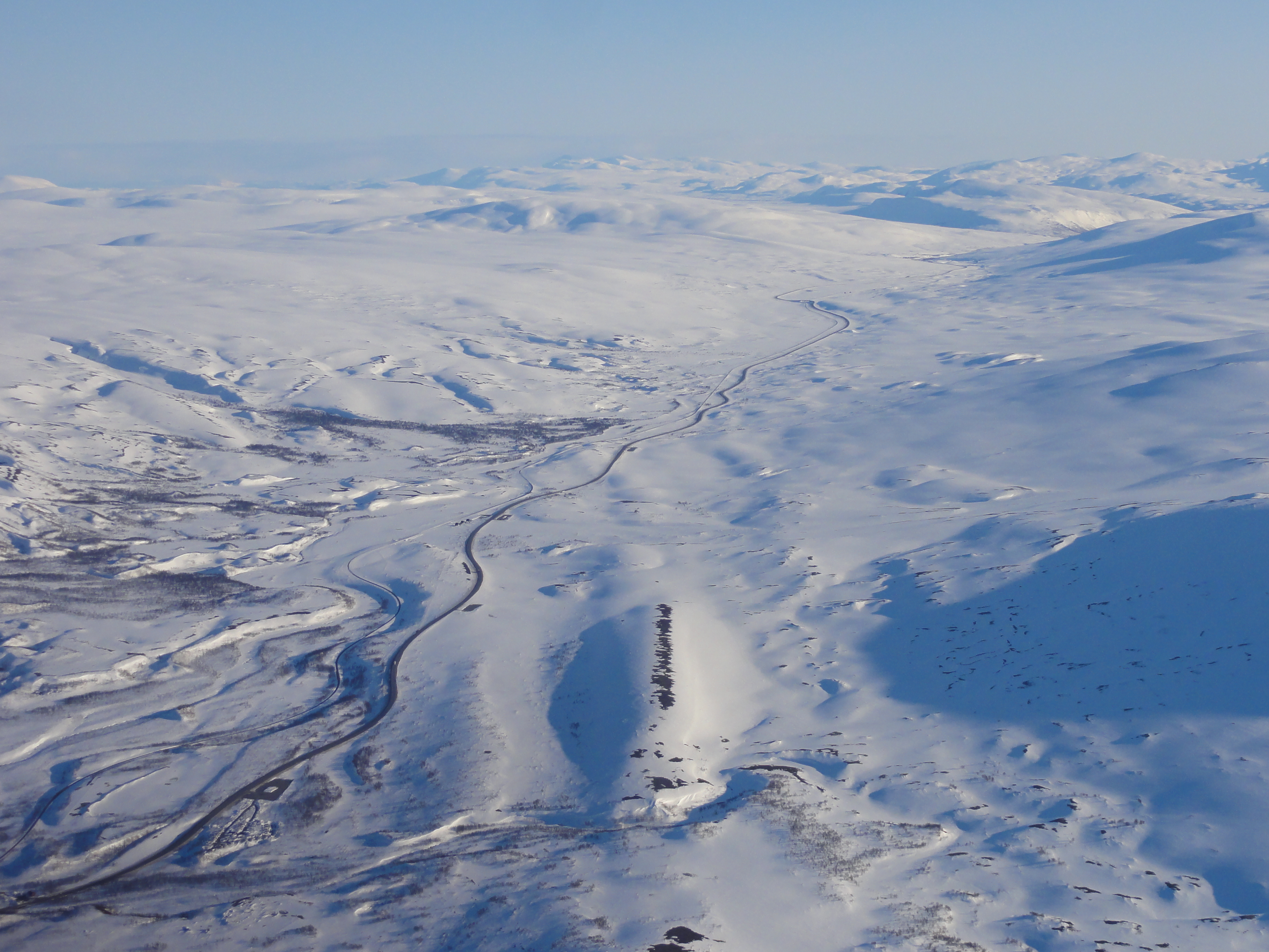 Saltfjellet og Lønsdalen sett fra fly med utsikt mot sør. Europavei 6 og Nordlandsbanen slynger seg inn over fjellplatået. Sørelva brøytestasjon nederst til venstre.